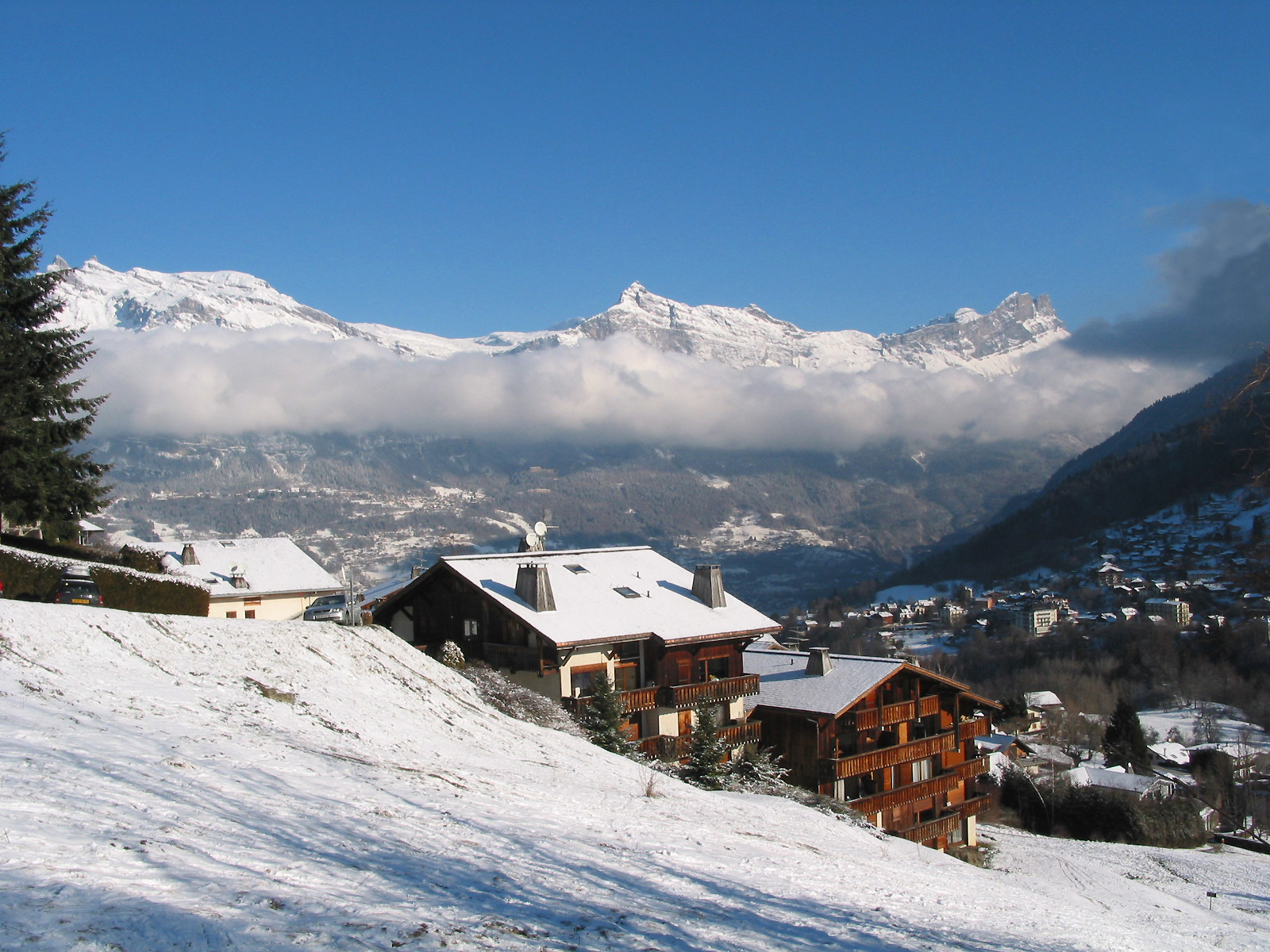 Saint-Gervais-les-Bains (Haute-Savoie - France), la Tête du Colonney, la Pointe de Platé, la Pointe du Dérochoir et la Chaîne des Fiz vues depuis la rue du Mont Joly.